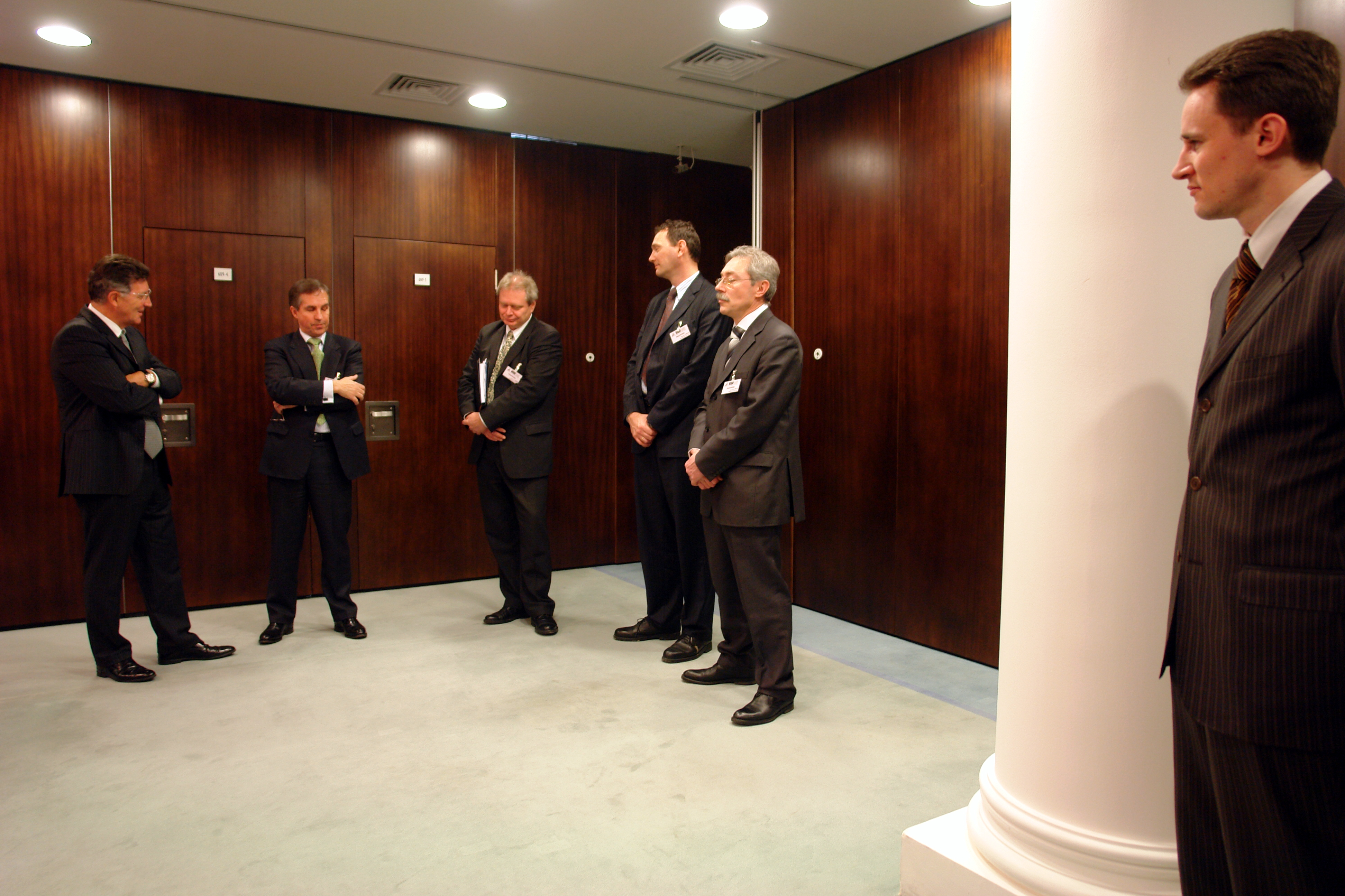 Международная финансовая корпорация (IFC) заключает соглашение о инвестировании в акционерный капитал МДМ-Банка до $100 млн. USD